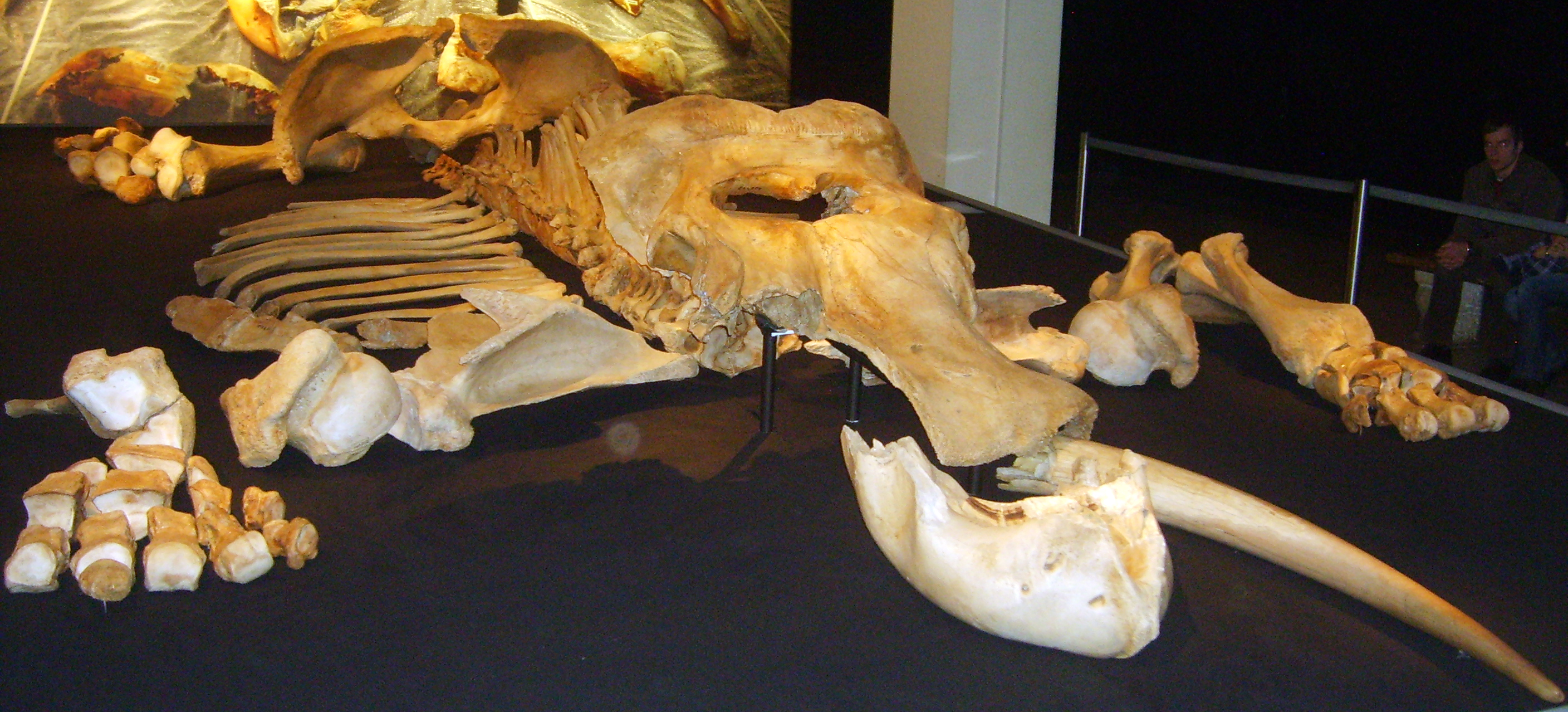 Elephas (Palaeoloxodon) antiquus skeleton, Naturkunde Museum, Berlin.